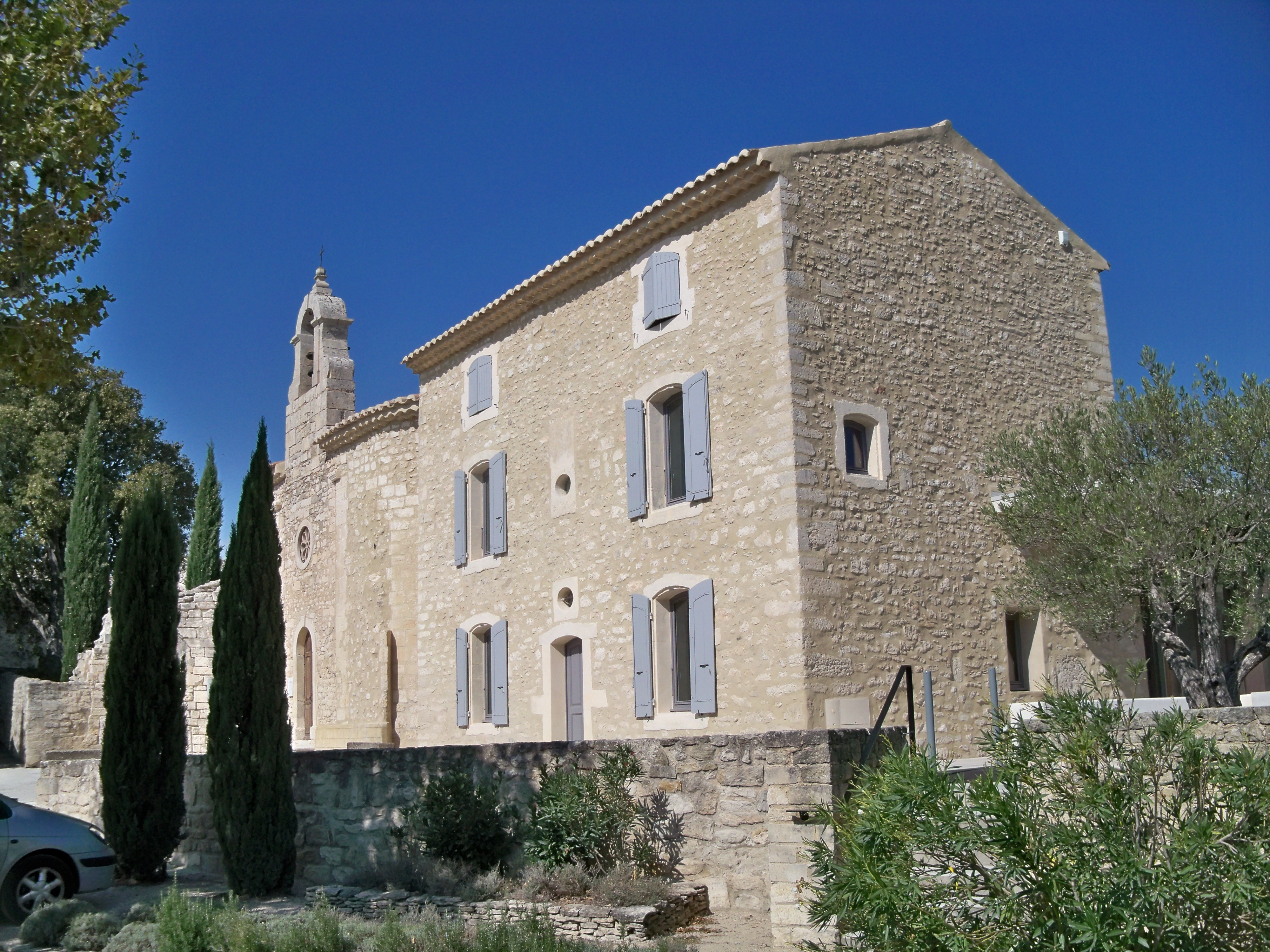 Église de Solérieux, (Inscription, 1926) .